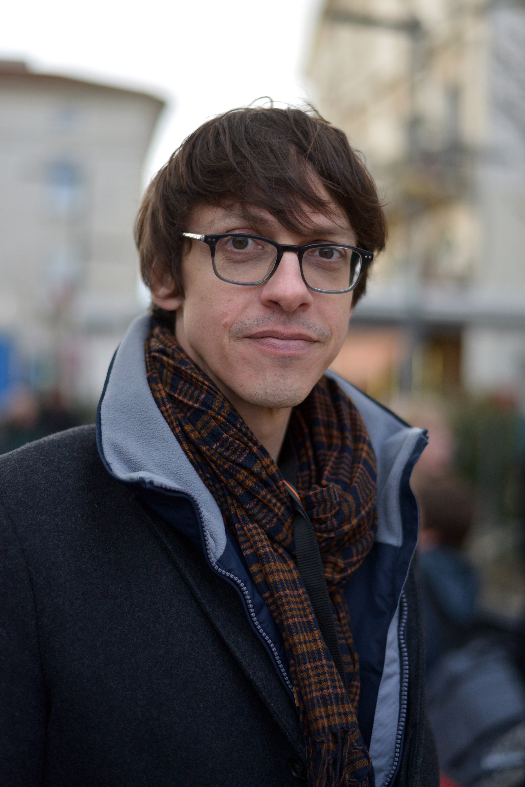 Fabien Vehlmann à la Marche des auteurs de bande dessinée le 31 janvier 2015 lors du Festival d'Angoulême.